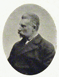 Viggo Hørup - danish politician